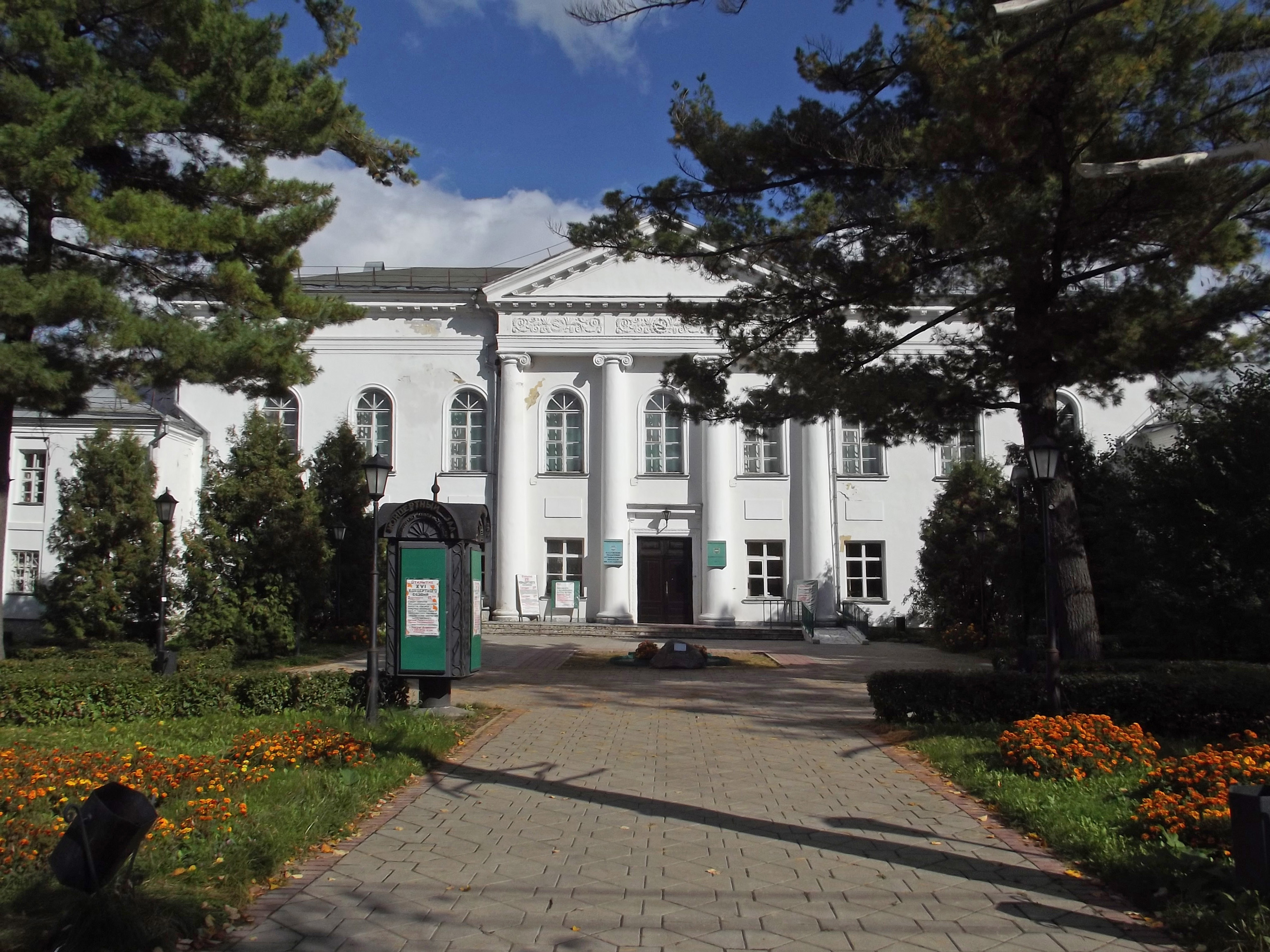 Концертный зал колледжа им. Танеева